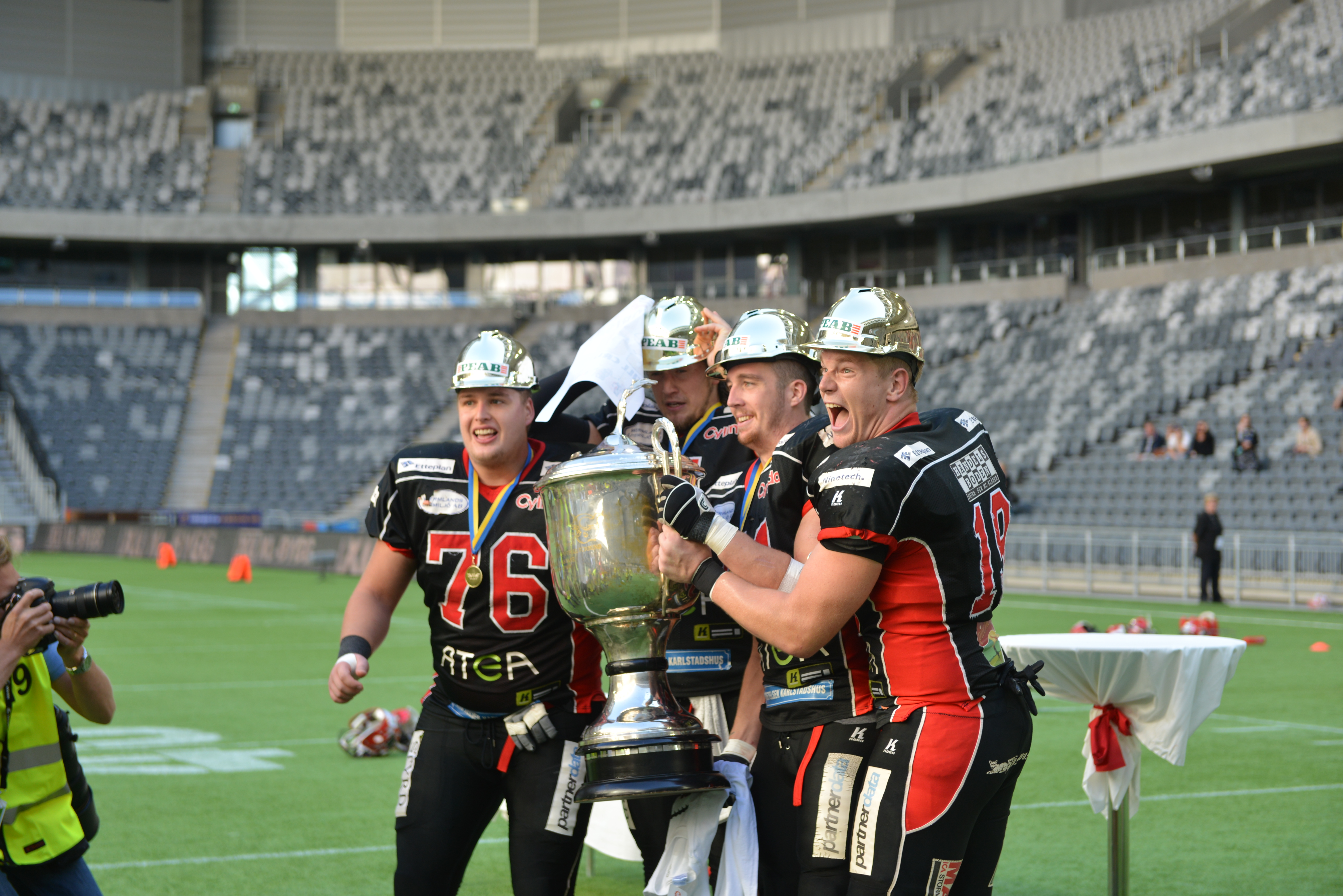 SM-final XXIX i amerikansk fotboll 2014-09-07 mellan Carlstad Crusaders och Öebro Black Knights. Matchen spelades på Tele2 arena och Carlstad vann med 49-9 och vann därmed sitt femte raka SM-guld. This file was made possible through the pool of technology at Wikimedia Sverige.